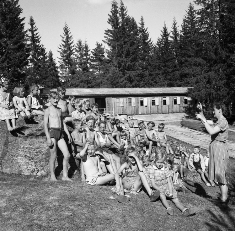 Norsk Folkehjelps feriekoloni Syverud, barn, kvinne.